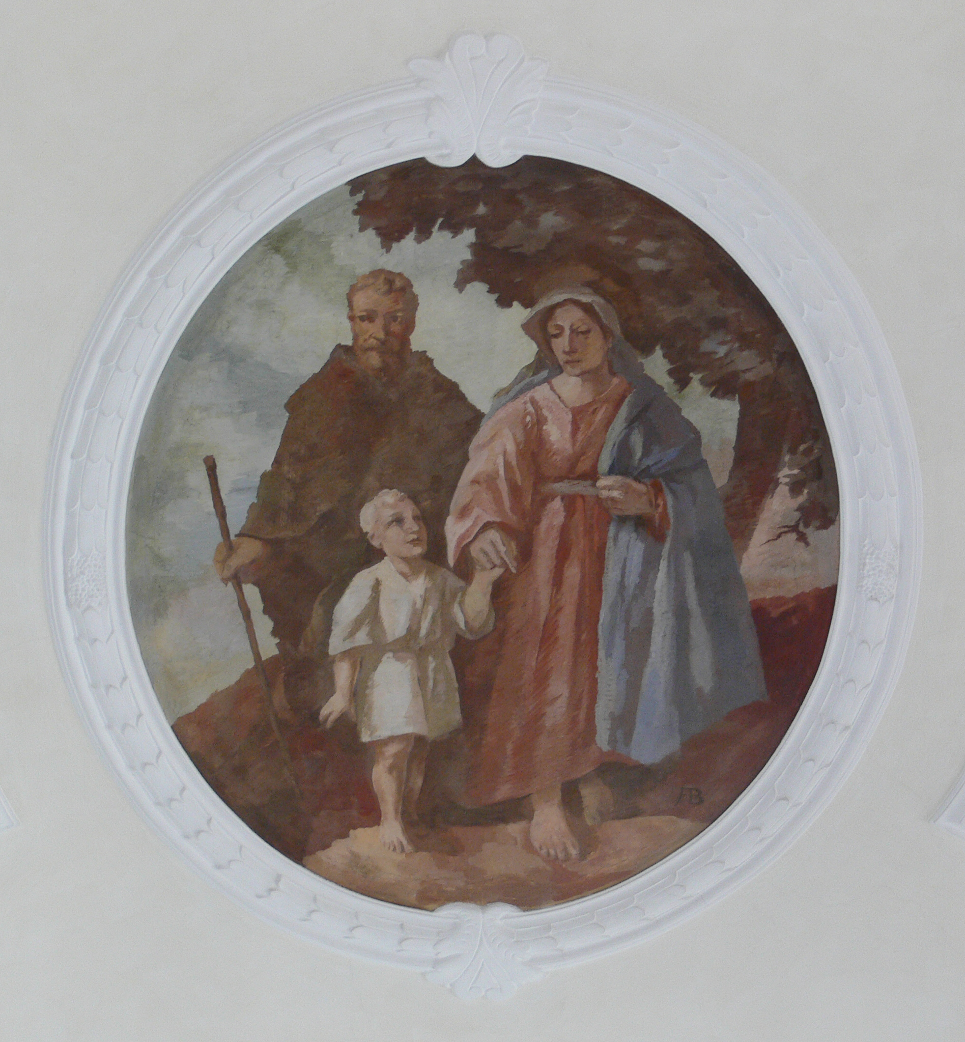 Pfarrkirche St. Gordianus und Epimachus, Aitrach, Landkreis Ravensburg Deckengemälde "Heiliger Wandel"